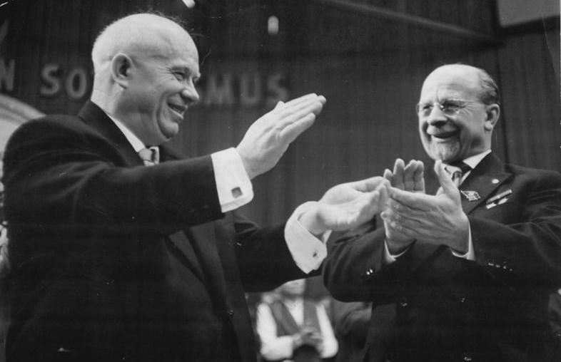 Zentralbild Kollektiv Sta-At. 16.1.1963 VI. Parteitag der SED vom 15.-21.1.1963 in der Werner-Seelenbinder-Halle in Berlin (2.Tag). UBz. Begeisterter Beifall der Delegierten und Gäste des VI. Parteitages nach der bedeutungsvollen Rede N.S. Chruschtschows. (Links): Der Erste Sekretär des ZK der KPdSU N.S. Chruschtschow und (rechts) der Erste Sekretär des ZK der SED Walter Ulbricht. (Sturm)